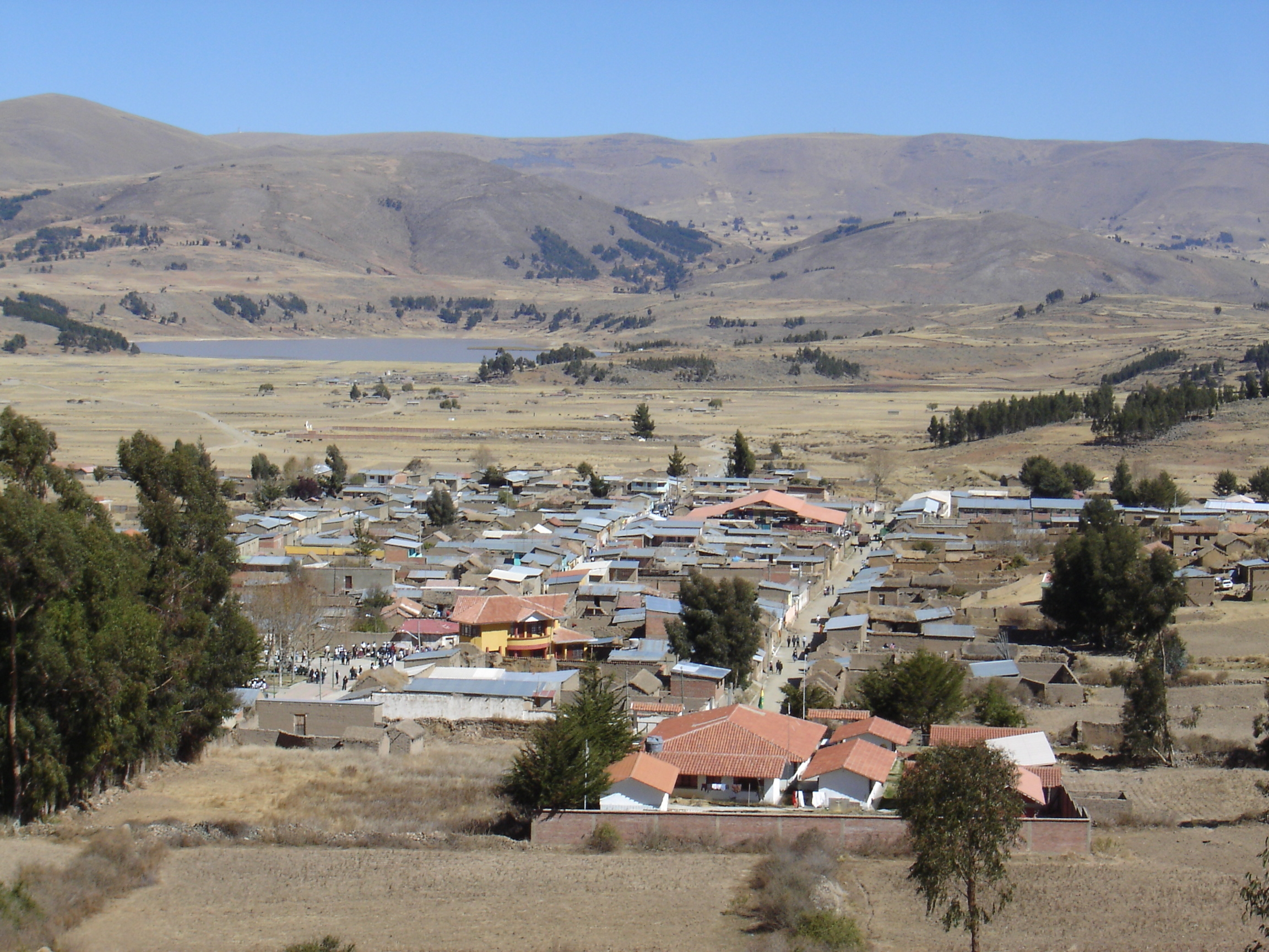 Una vista panorámica de la población de Vacas, desde el lugar del Calvario de la Virgen Santa Bárbara.